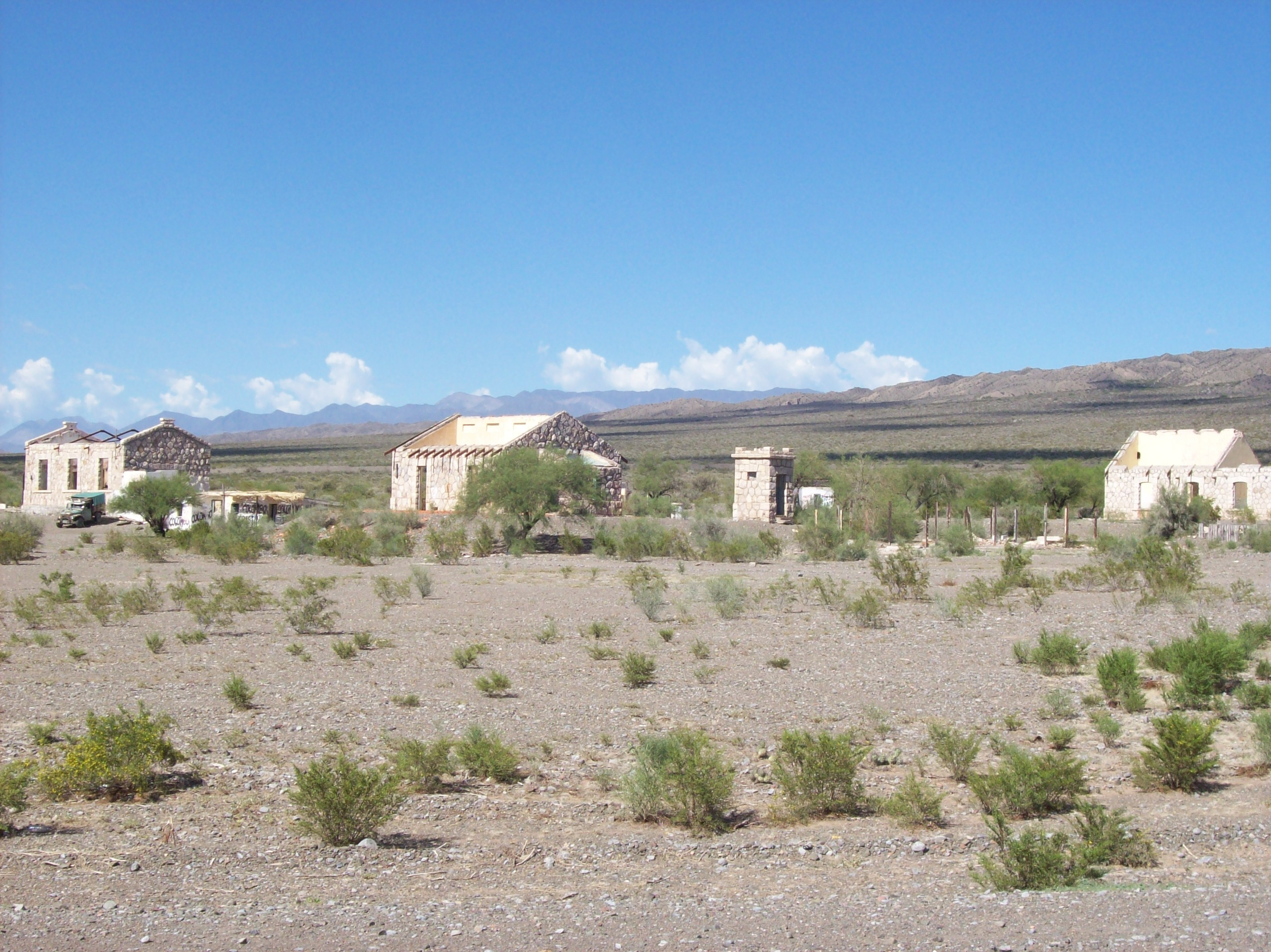 Ruinas de la ex-estación Talacasto del Ferrocarril General Belgrano en el departamento Ullum, Provincia de San Juan, Argentina. Imagen tomada desde la intersección de la Ruta Provincial 436 y Ruta Nacional 40.